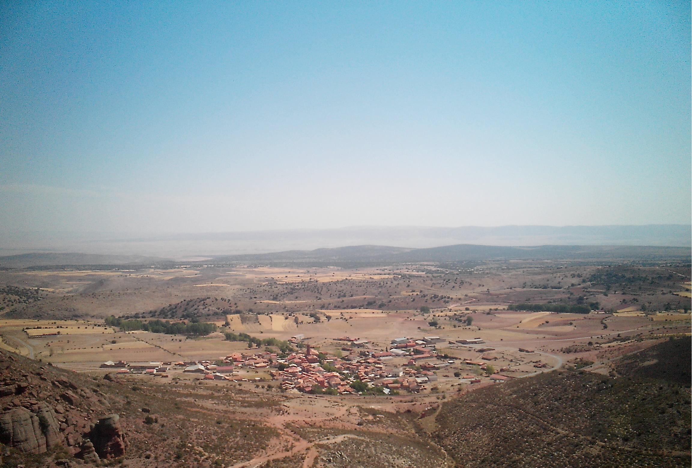 Imagen panorámica de Peracense (Teruel) desde su Castillo.